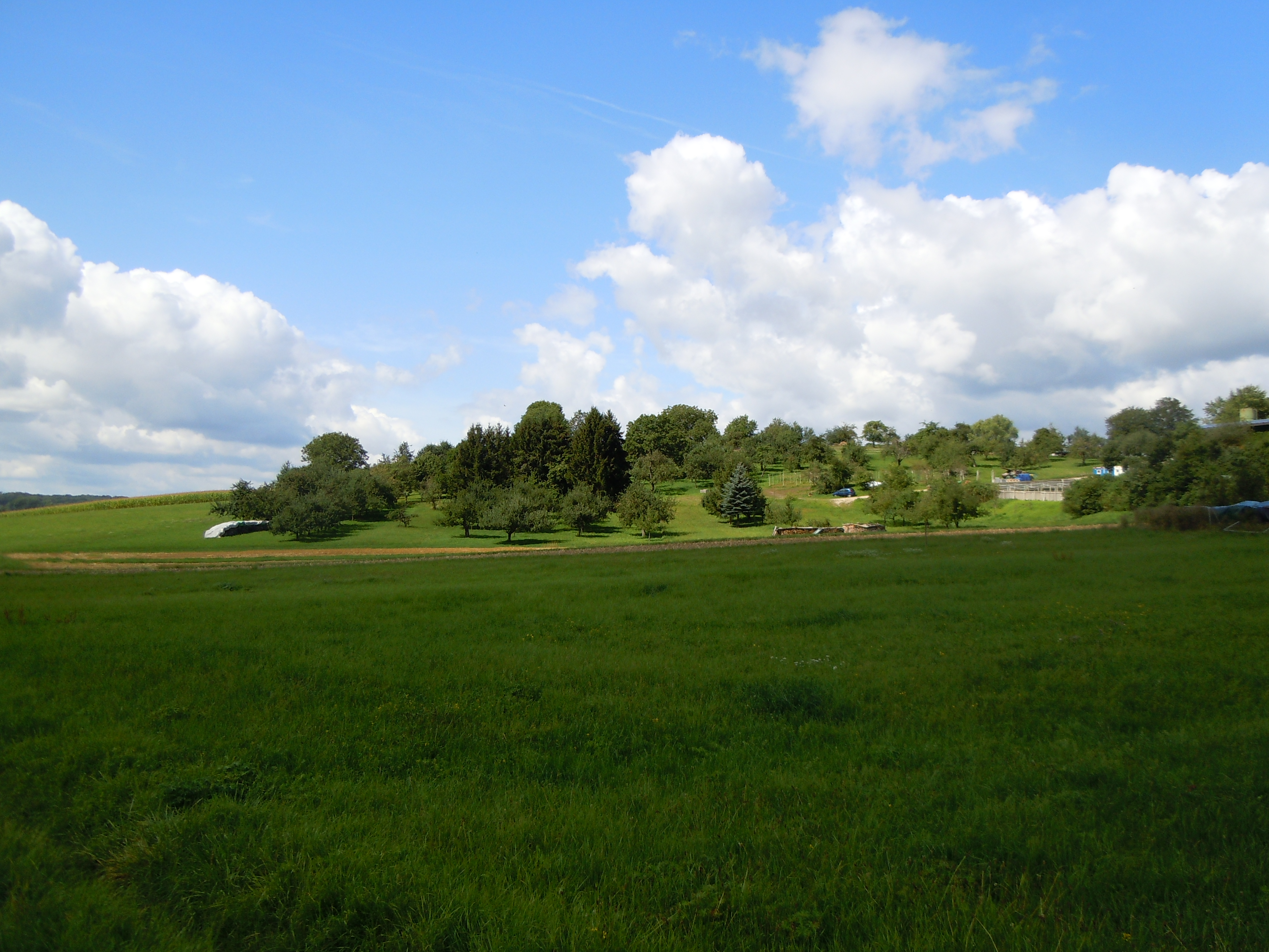 Kräuterbühl Raidwangen, Blickrichtung West